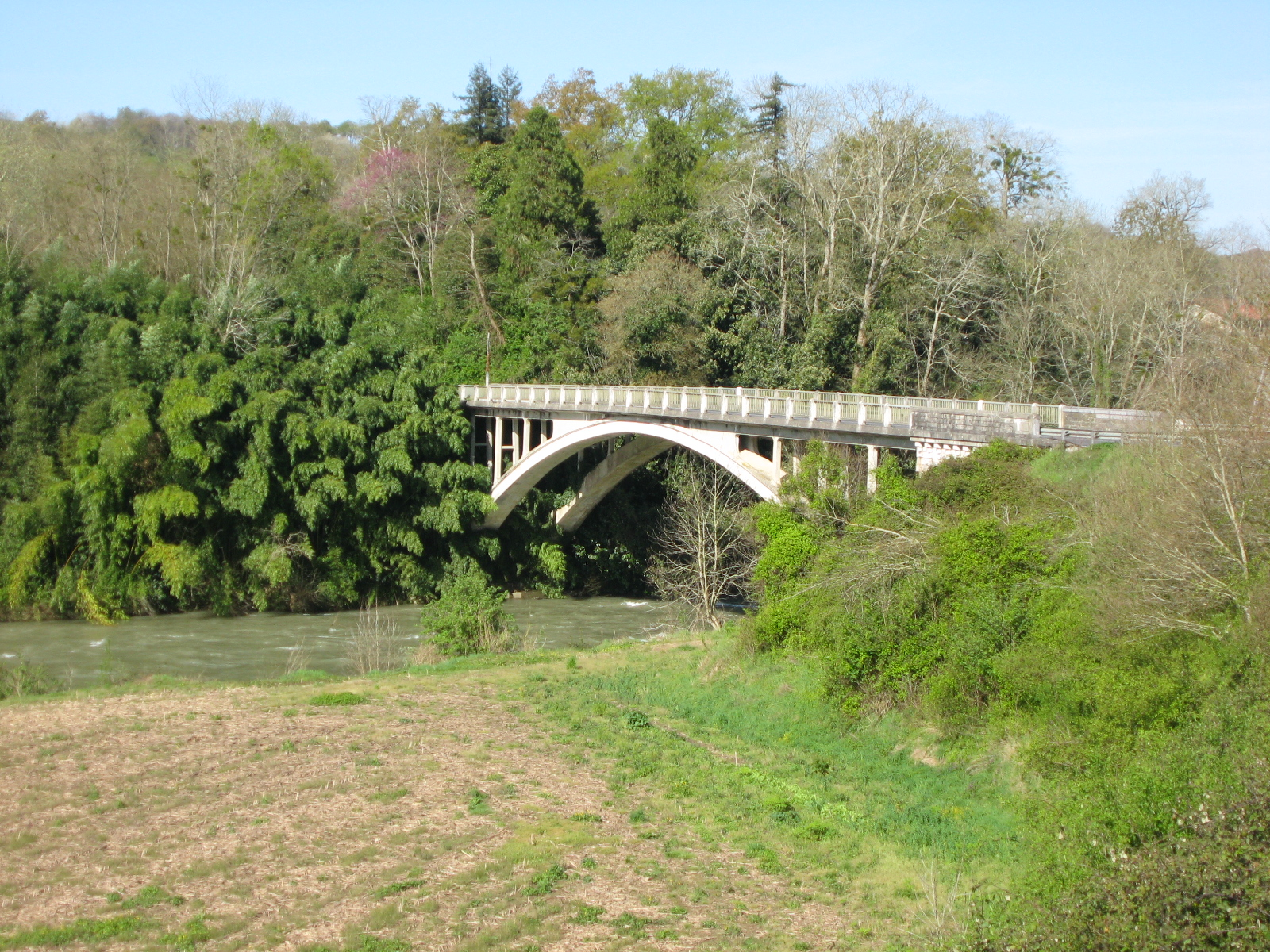 Le Saison à Autevielle (Pyrénées-Atlantiques) (Pyrénées).